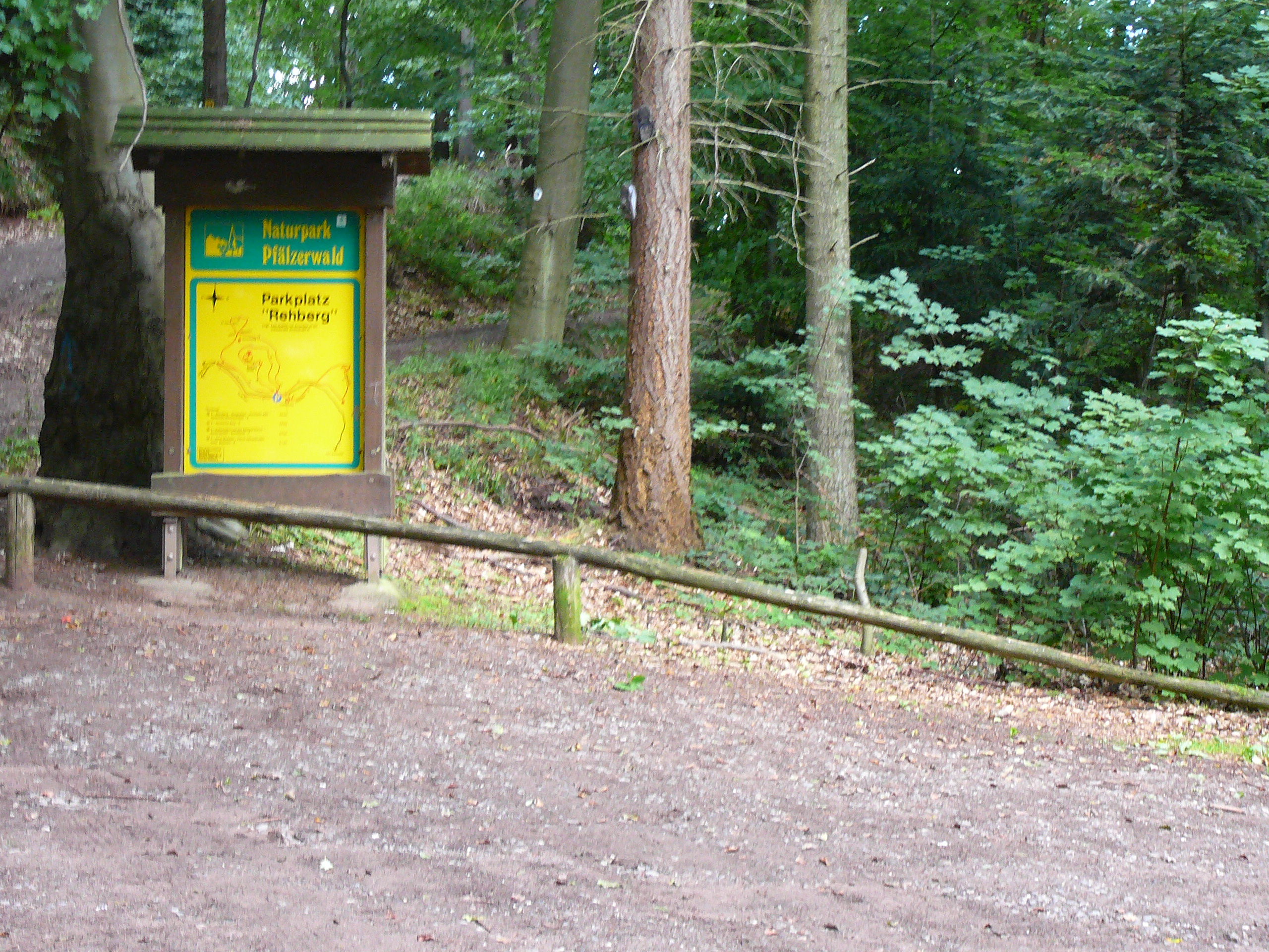 Wanderparkplatz "Rehberg" an der Trifelsstraße